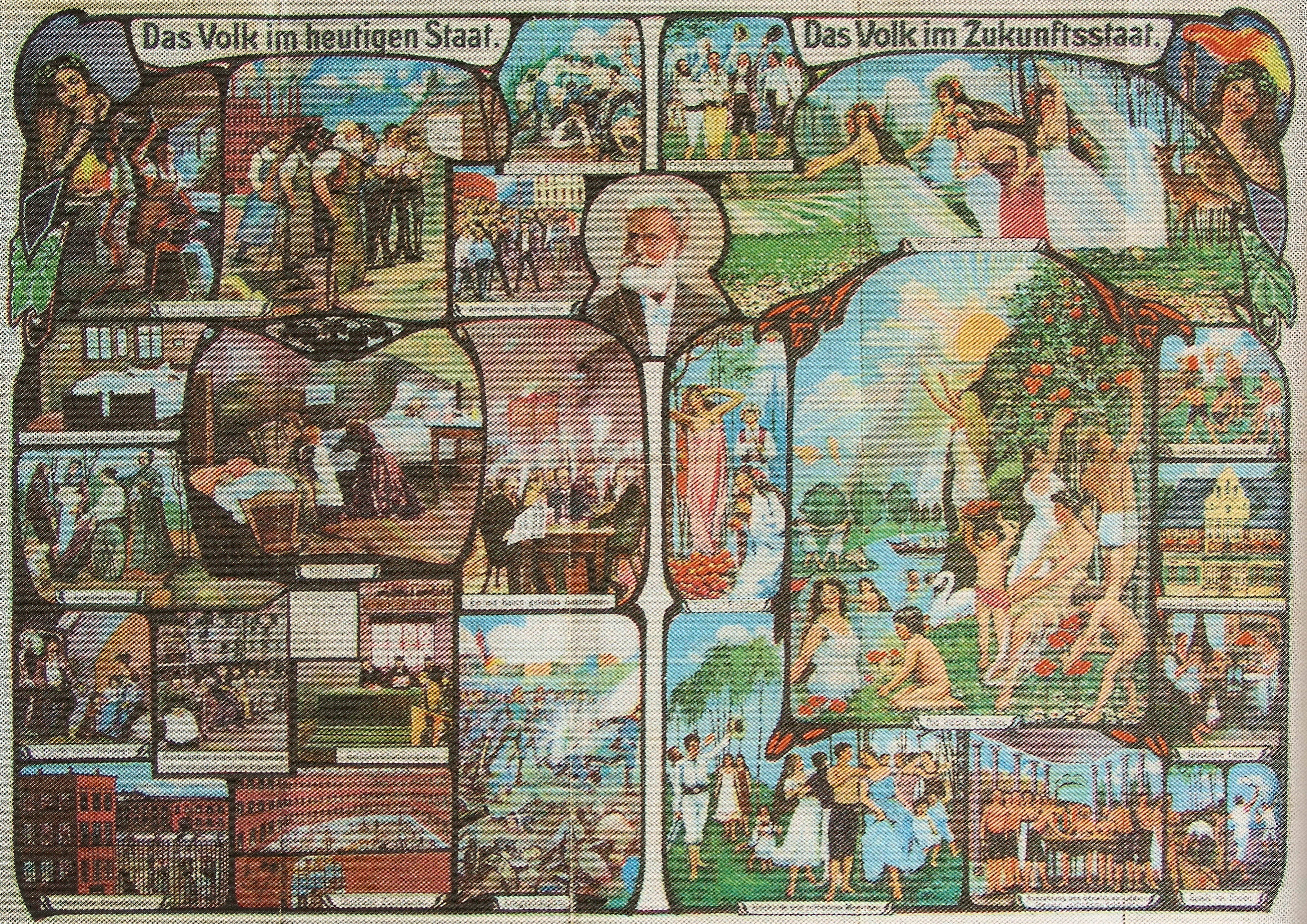 Illustration zu dem Buch von Friedrich Eduard Bilz: Der Zukunftsstaat. Staatseinrichtung im Jahre 2000. Verlag F.E. Bilz, Leipzig 1904